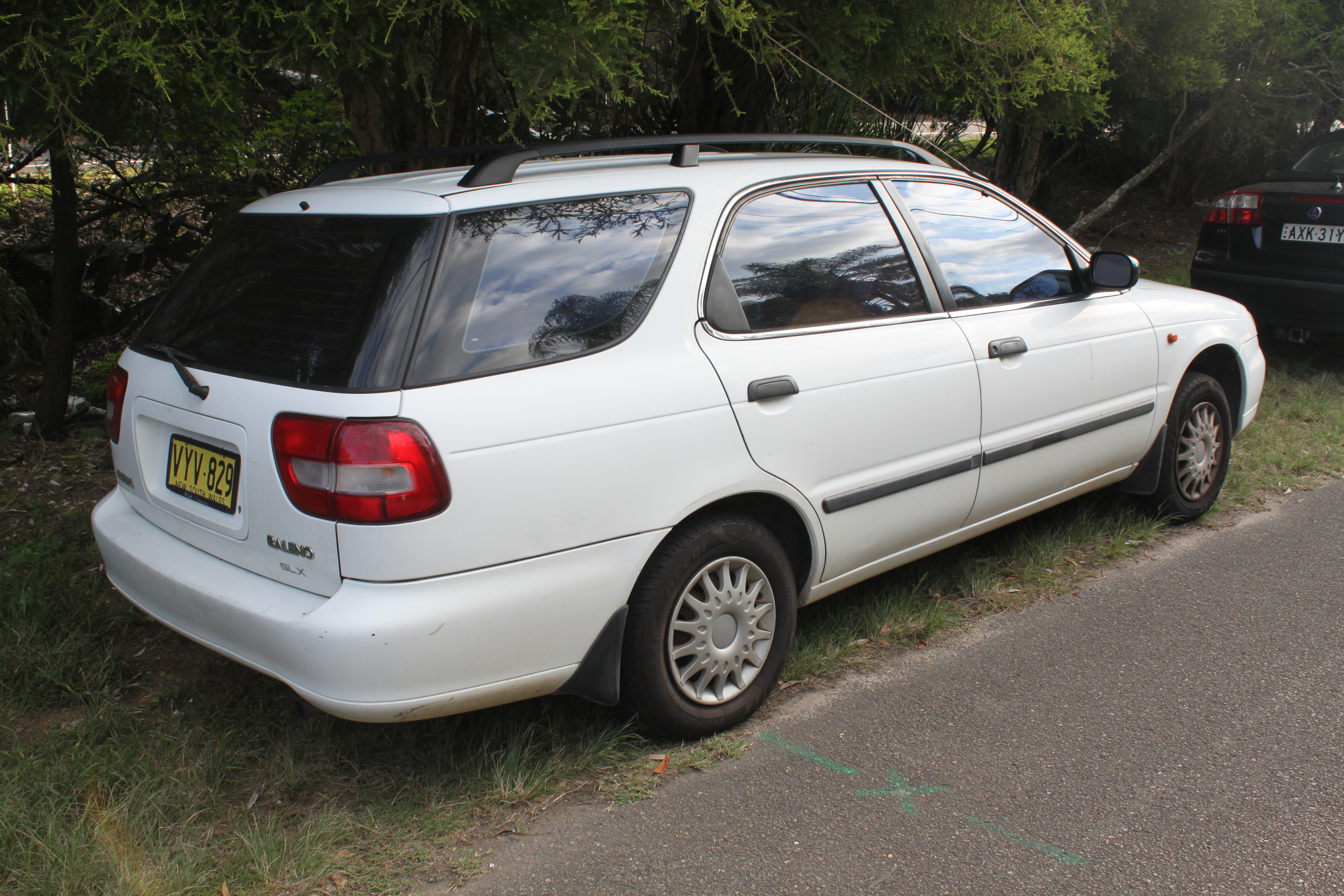 Suzuki Baleno SY416 GLX Wagon